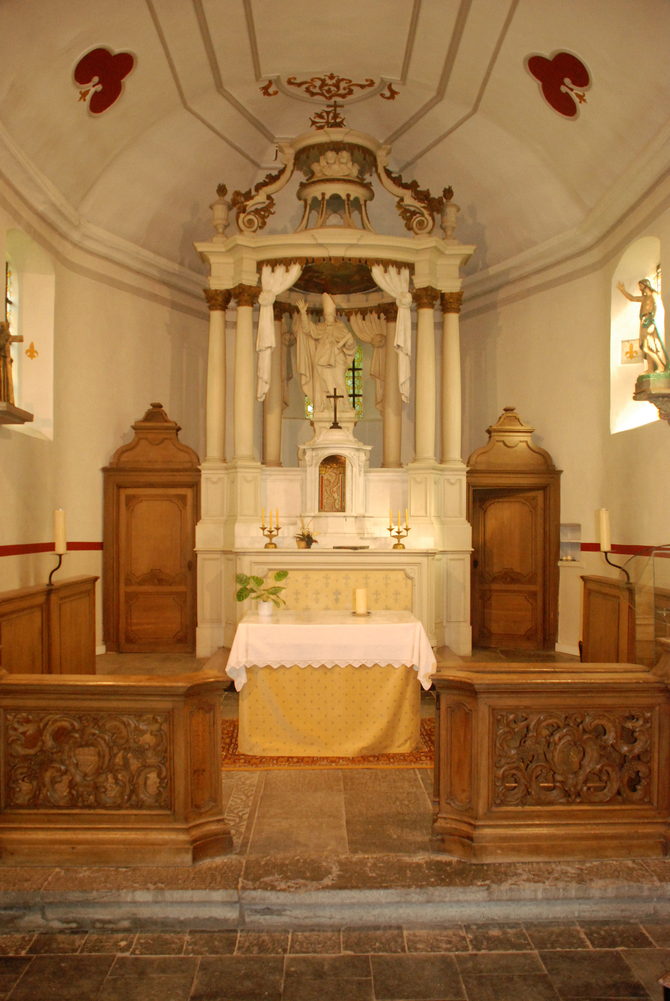 Belgique - Brabant wallon - Chapelle Saint-Martin de Lillois-Witterzée